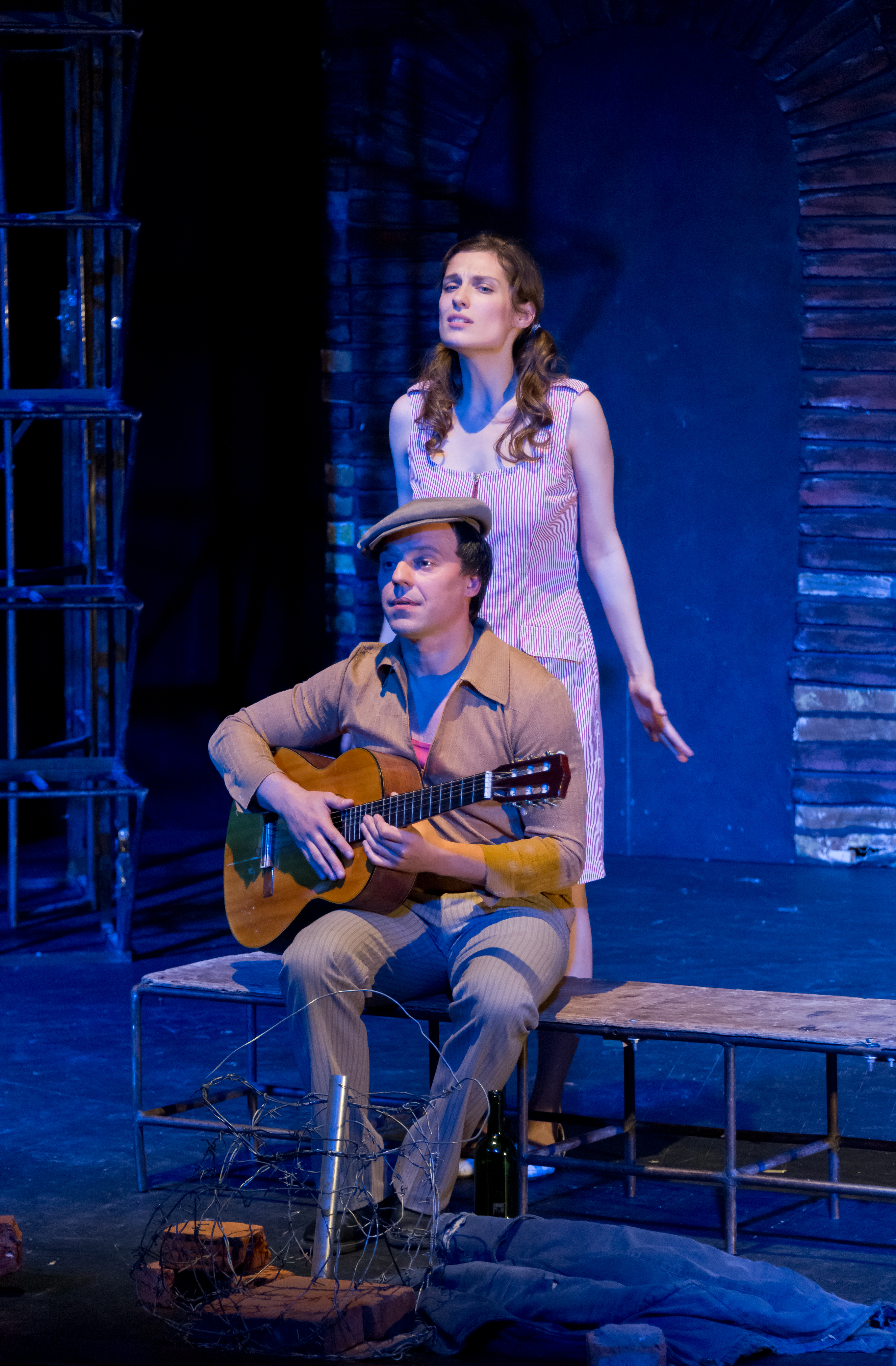 Спектакль «Роман о девочках» на сцене театра «У Никитских ворот» 08.10.2017